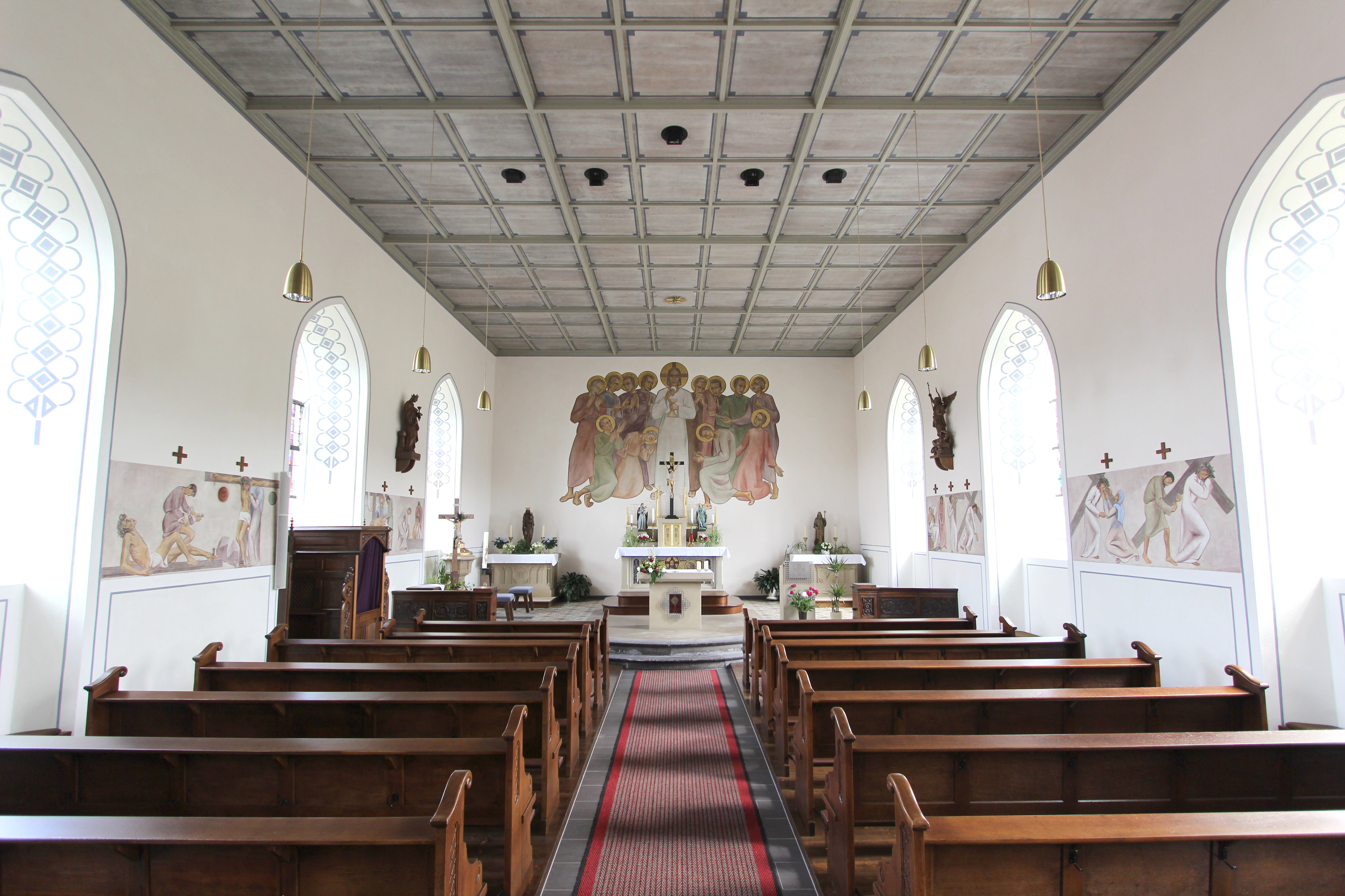 54597 Ormont, Kirchweg 1. Neugotischer Saalbau, 1850. Aufnahme von 2017.